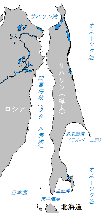 File:Strait of Tartary.PNGから作成